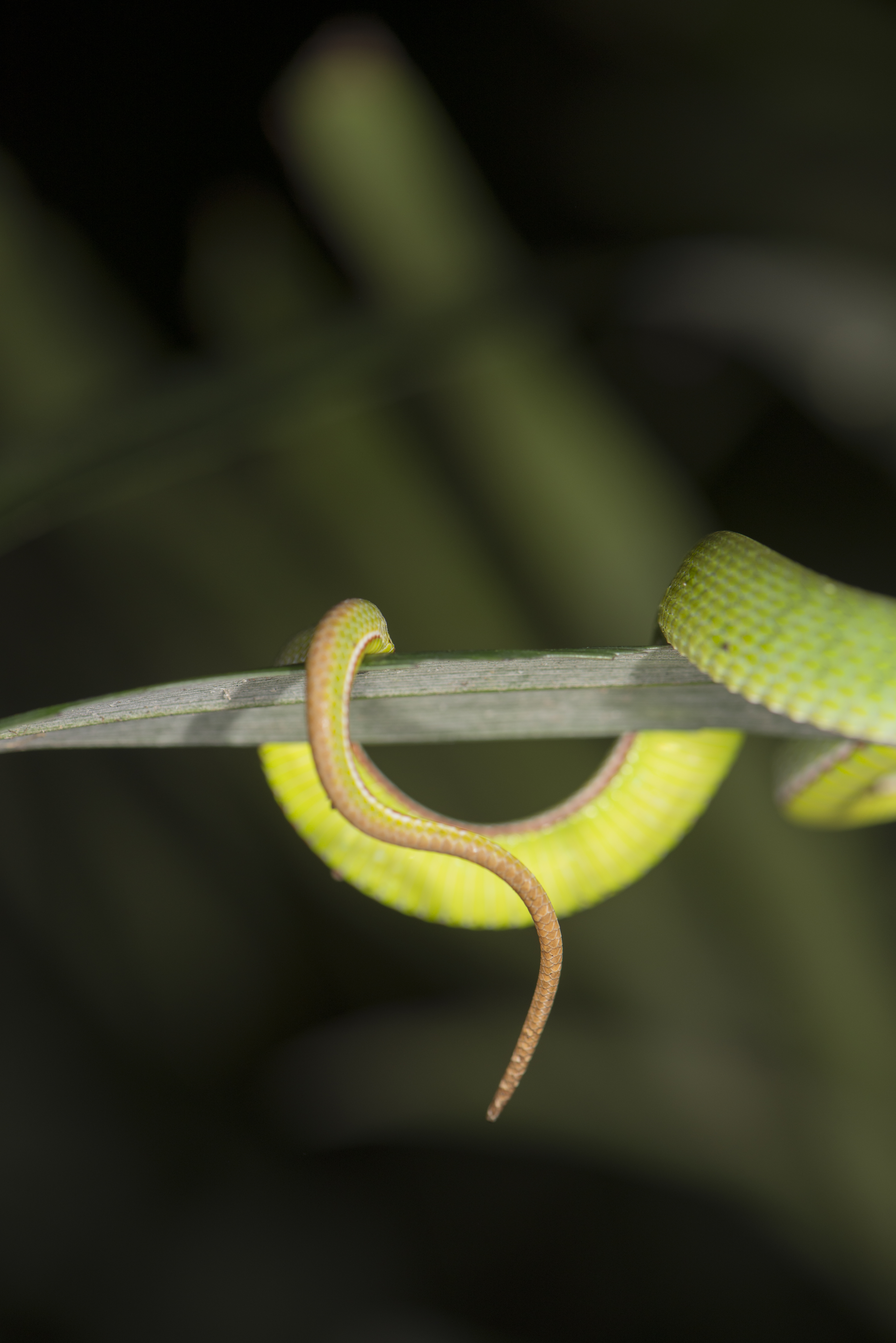 Trimeresurus stejnegeri Schmidt, 1925 赤尾青竹絲